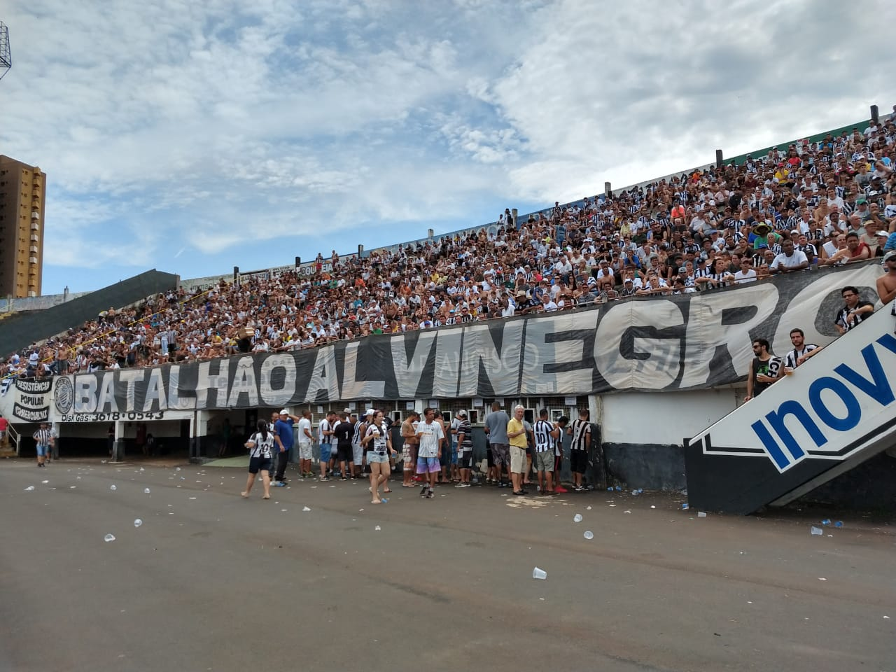 Torcida B.A.F.O. - Batalhão Alvinegro Força Organizada, do Comercial Futebol Clube de Ribeirão Preto/SP.